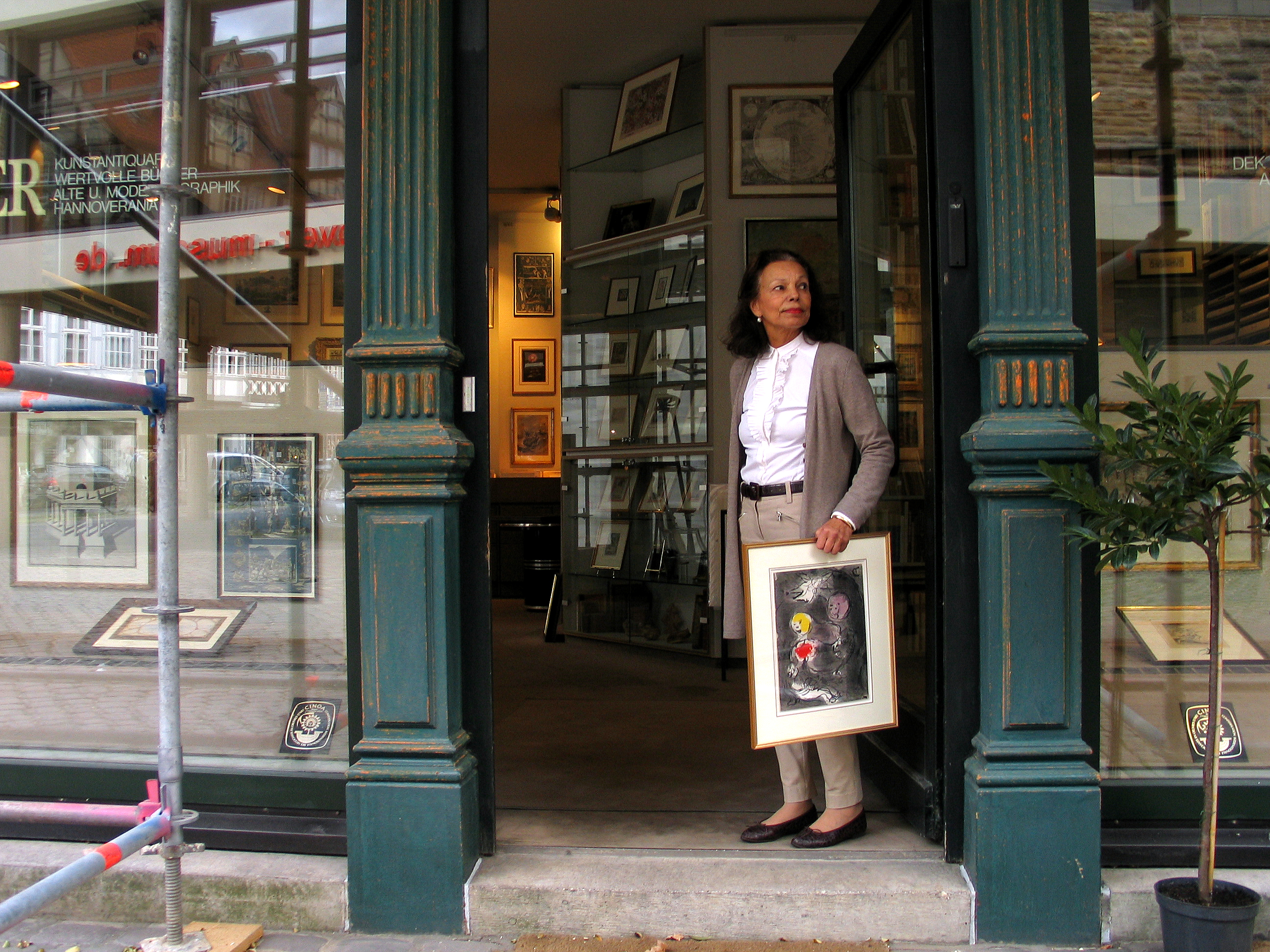 Jutta B. Bauer, Galeristin des Kunstantiquariats j. H. Bauer neben dem Leibnizhaus in Hannover, mit einem gerahmten Marc Chagall im Seiten-Eingang in der Pferdestraße ...